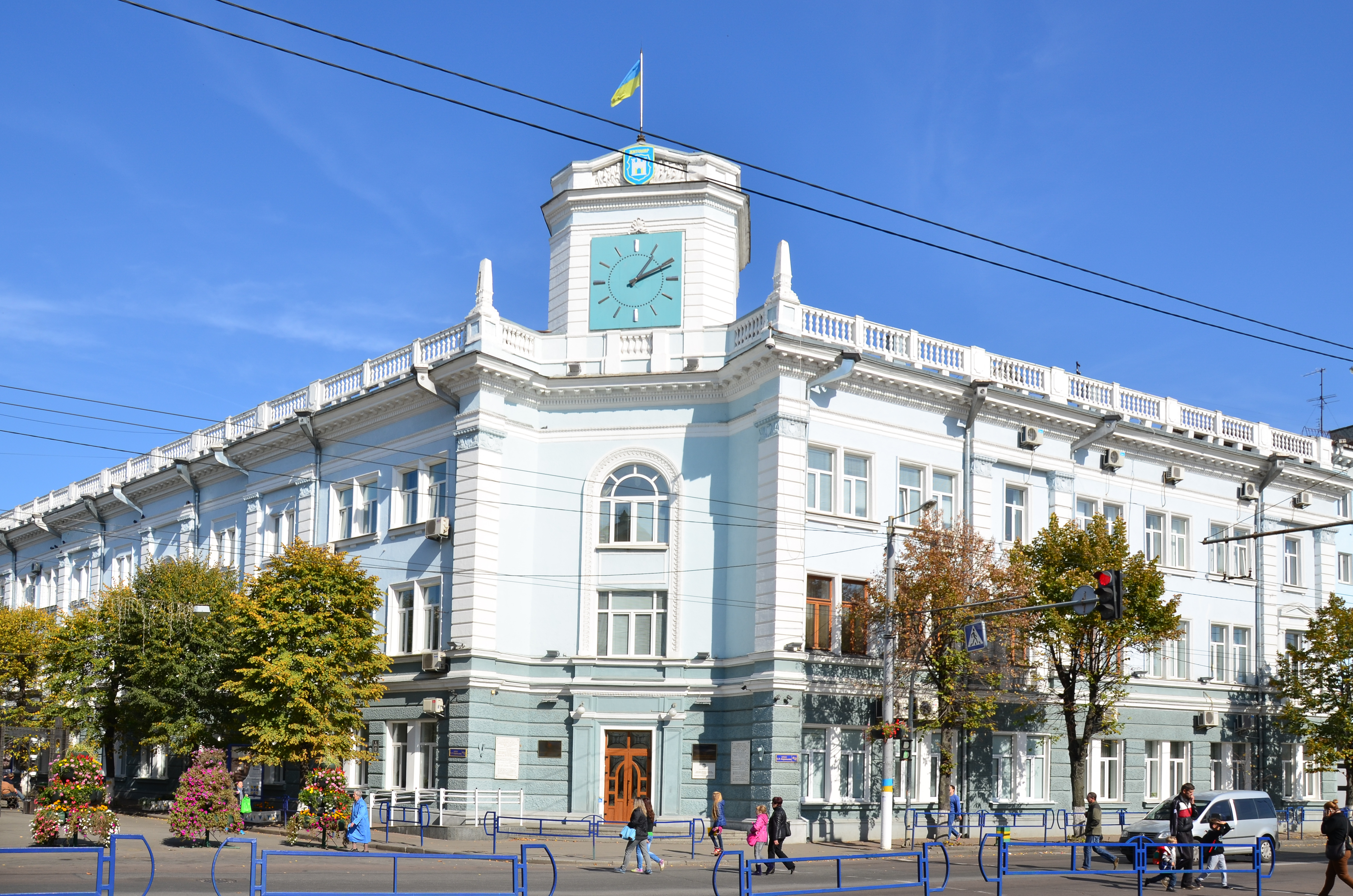 Будинок взаємного кредиту (міська рада), Житомир, Майдан Корольова, 4/2